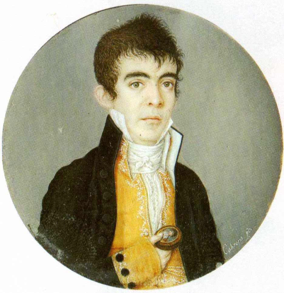 Autoretrato de Francisco Cabrera, de 1819.